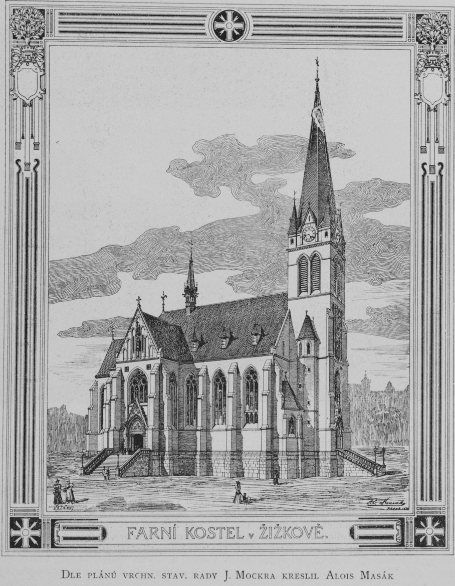 Kostel sv. Prokopa, Žižkov (projekt arch. Josefa Mockera)